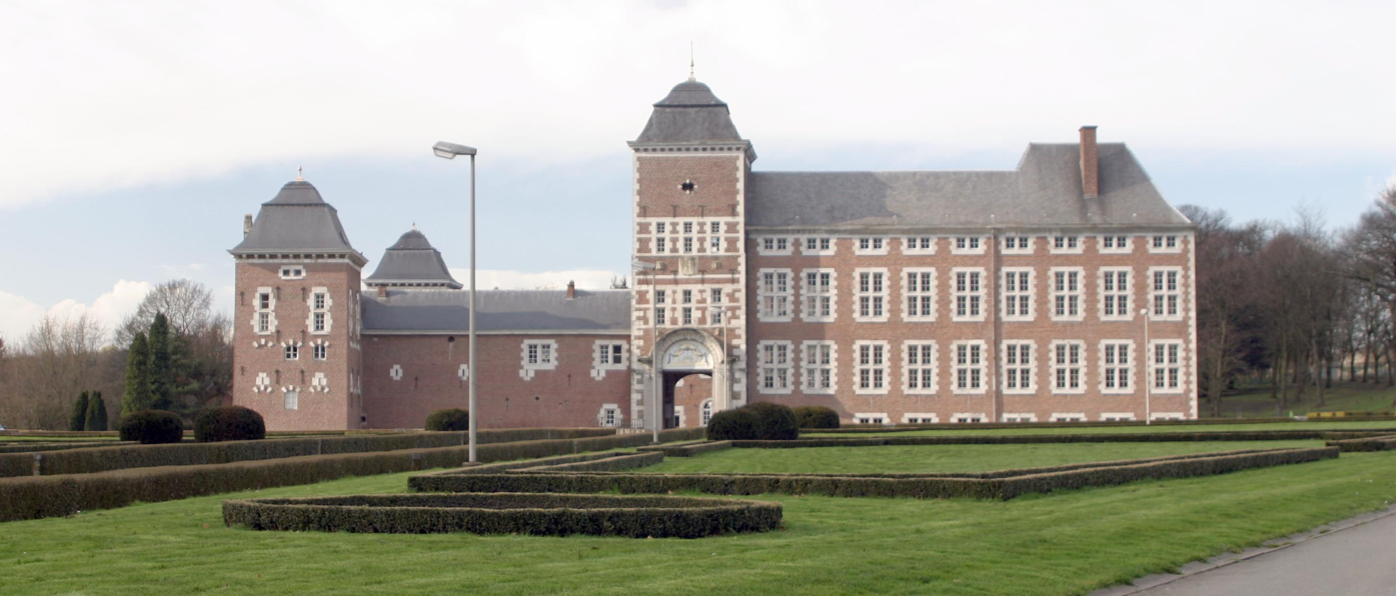 Schlass Wegimont Totale